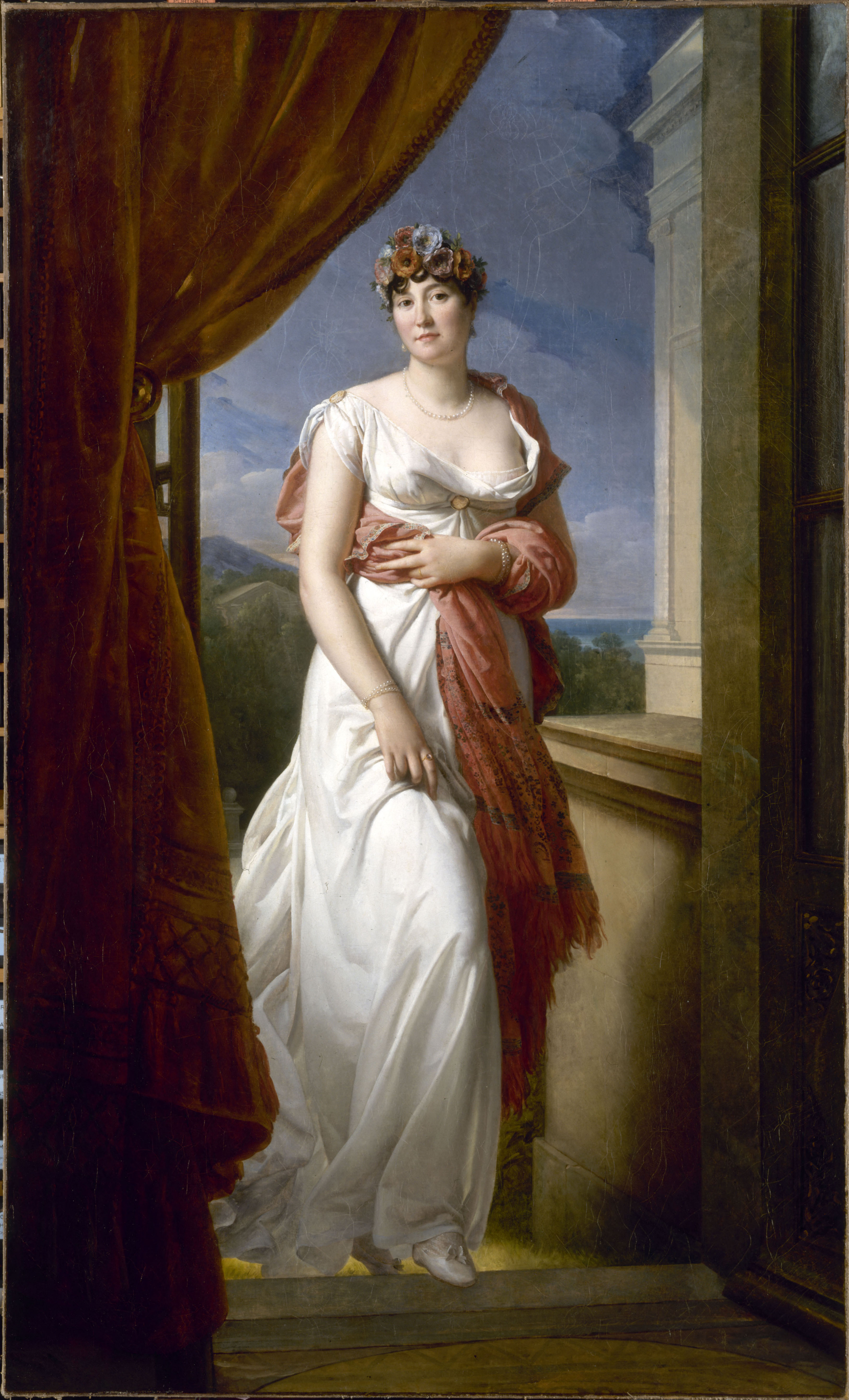 Caption from the museum Pour être resté jusqu’à une date récente dans la descendance du modèle, le portrait de Madame Tallien (1773-1837), pourtant l’un des plus spectaculaires qui soient dus au pinceau de Gérard, est resté peu connu. Il ne figura pas au Salon et l’on ignore avec certitude jusqu’à sa date de réalisation. Les premiers biographes de Gérard le datent de 1802 ou de 1804 ; la présence d’une alliance au doigt de la belle Thérésia autorise pourtant à penser qu’il fut réalisé après le mariage de l’ex-Madame Tallien avec le comte de Caraman, en 1805. Gérard a représenté Madame Tallien dans des vêtements à l'antique dont elle avait imposé la mode sous le Directoire. Il a rendu avec brio la stature majestueuse, le visage à la parfaite régularité, l'expression bienveillante de celle dont tous ses contemporains ont loué aussi bien la beauté que la bonté. La couronne d’anémones que porte le modèle avait sans doute un sens, mais la signification que lui attribue le plus souvent le langage des fleurs, la persévérance, est d’interprétation malaisée. La Ville de Paris a pu se porter acquéreur, en 2001, en vente publique, de ce magnifique portrait. Grâce à cet achat, une œuvre majeure du néoclassicisme français représentant une personnalité emblématique de la période révolutionnaire et de l'histoire de Paris, entre dans les collections permanentes du musée Carnavalet. Elle rejoint ainsi le portrait de Madame Récamier, autre chef-d'œuvre de Gérard ; les deux femmes, qui étaient amies et qui furent l'une et l'autre des personnalités en vue sous le Directoire et le Consulat, sont pour toujours, de nouveau réunies.